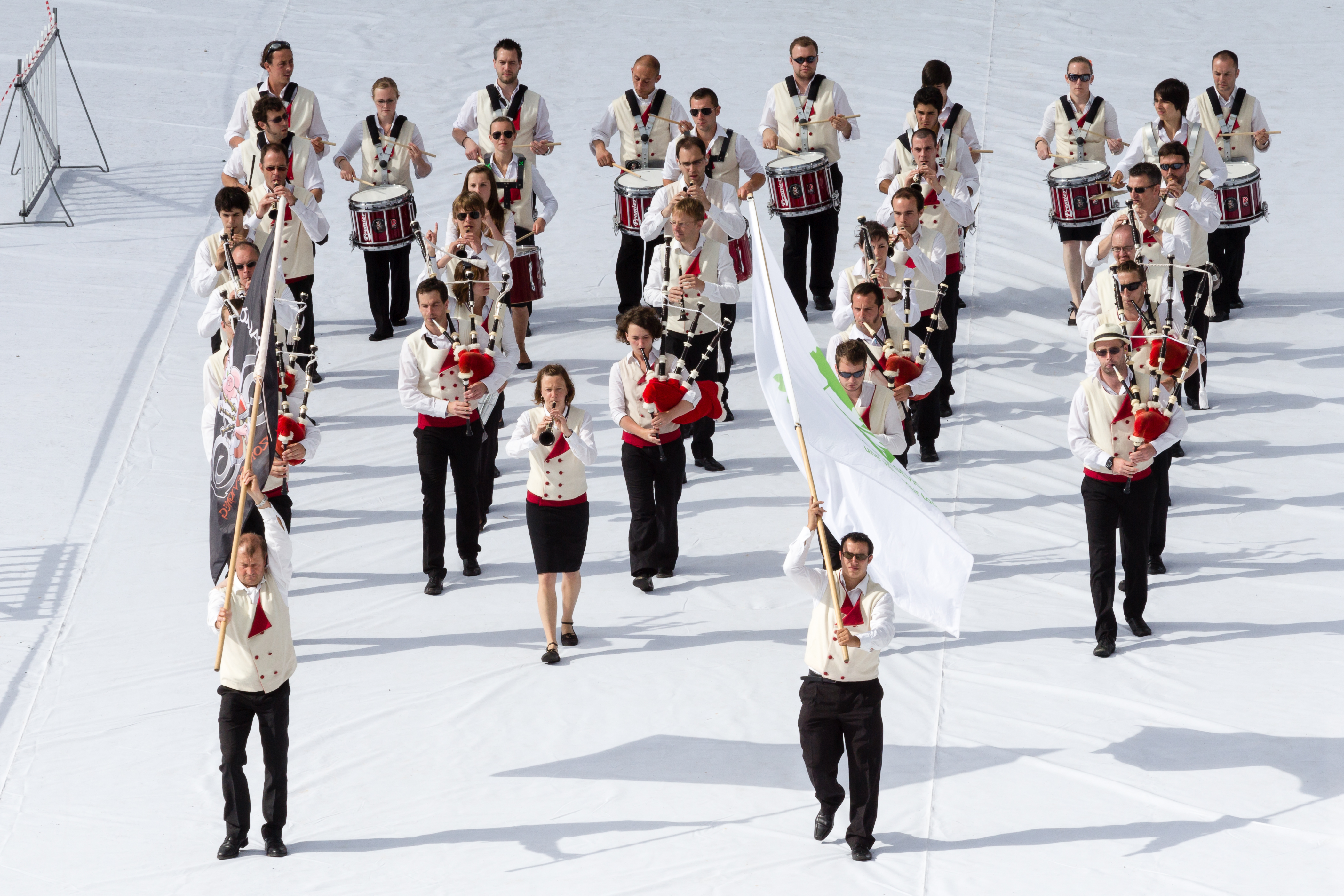 FIL 2012 - Arrivée de la grande parade des nations celtes - Bagad Saozon Sevigneg